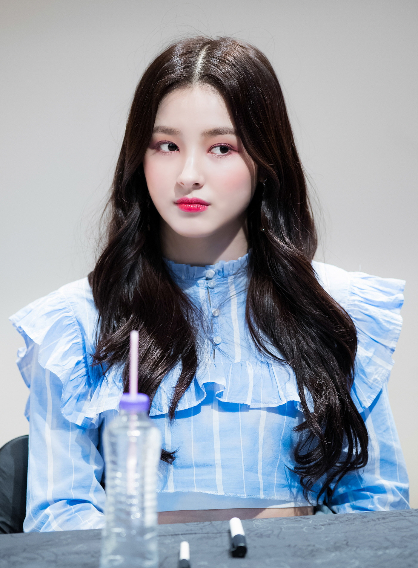 180113 종로 팬싸인회 모모랜드